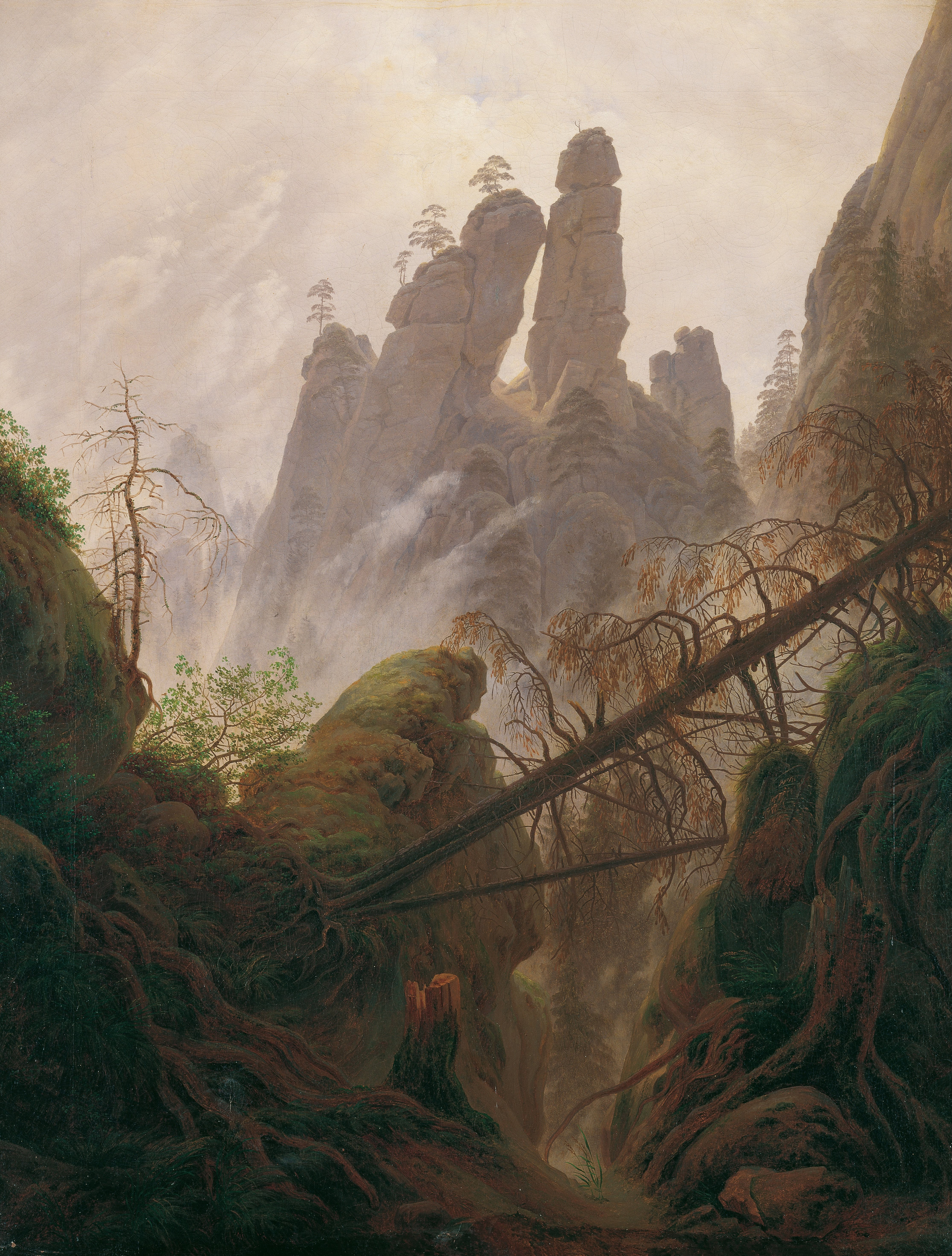 Dargestellt ist die Felsengruppe des Neurathener Felsentores (heute: Kleine Steinschleuder)